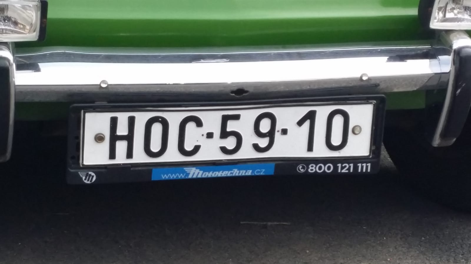 Registrační značka v letech 1953-1986 z okresu Hodonín